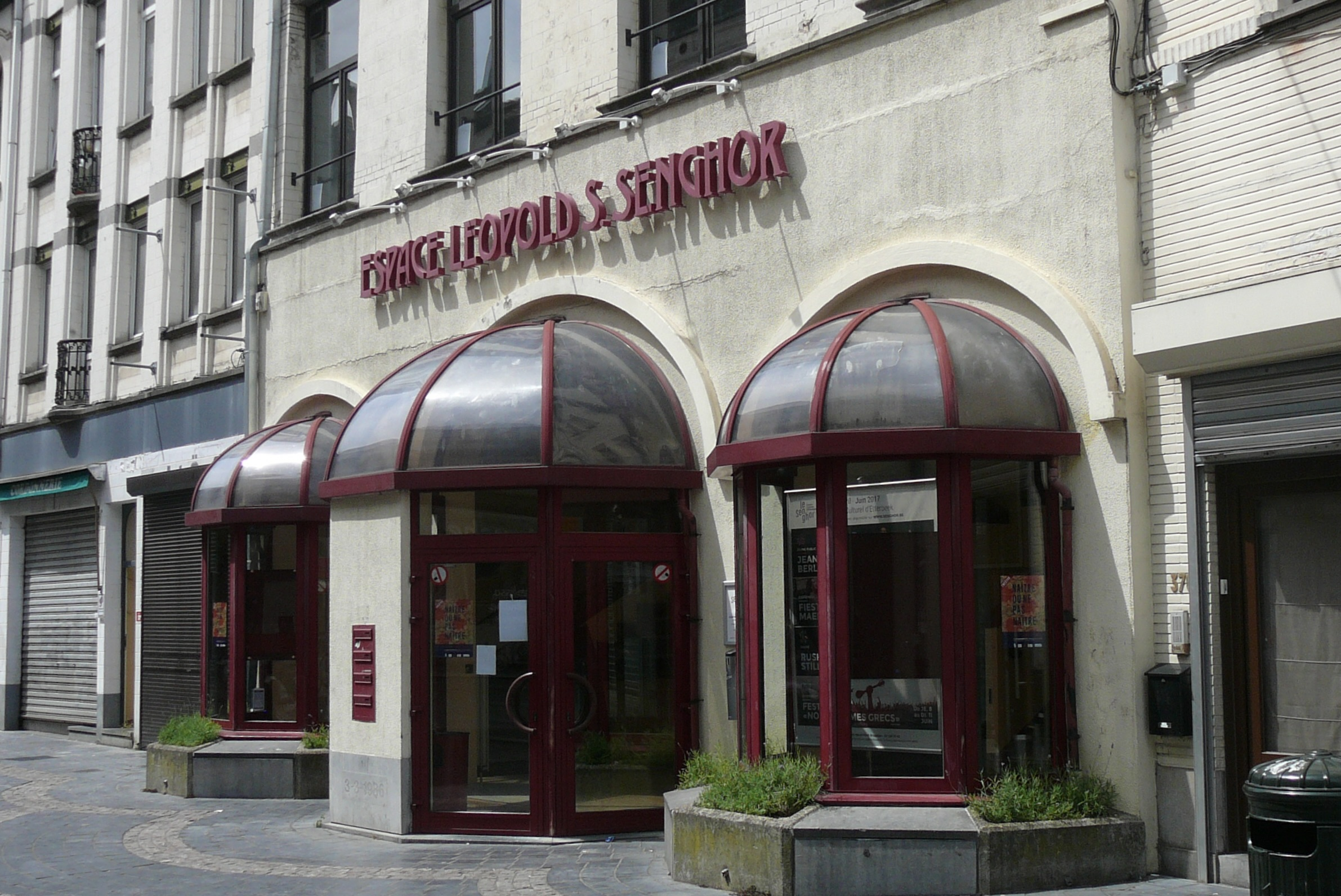 Espace Léopold Sédar Senghor, à Etterbeek, en Région bruxelloise, Belgique